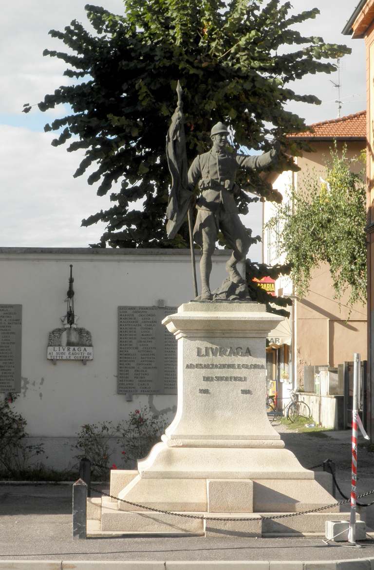 Monumento ai Caduti a Livraga